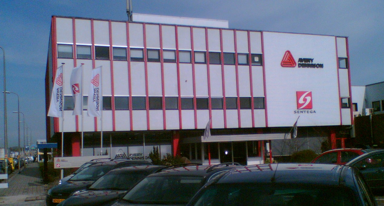 Avery Utrecht, St. Laurensdreef, Utrecht, NL